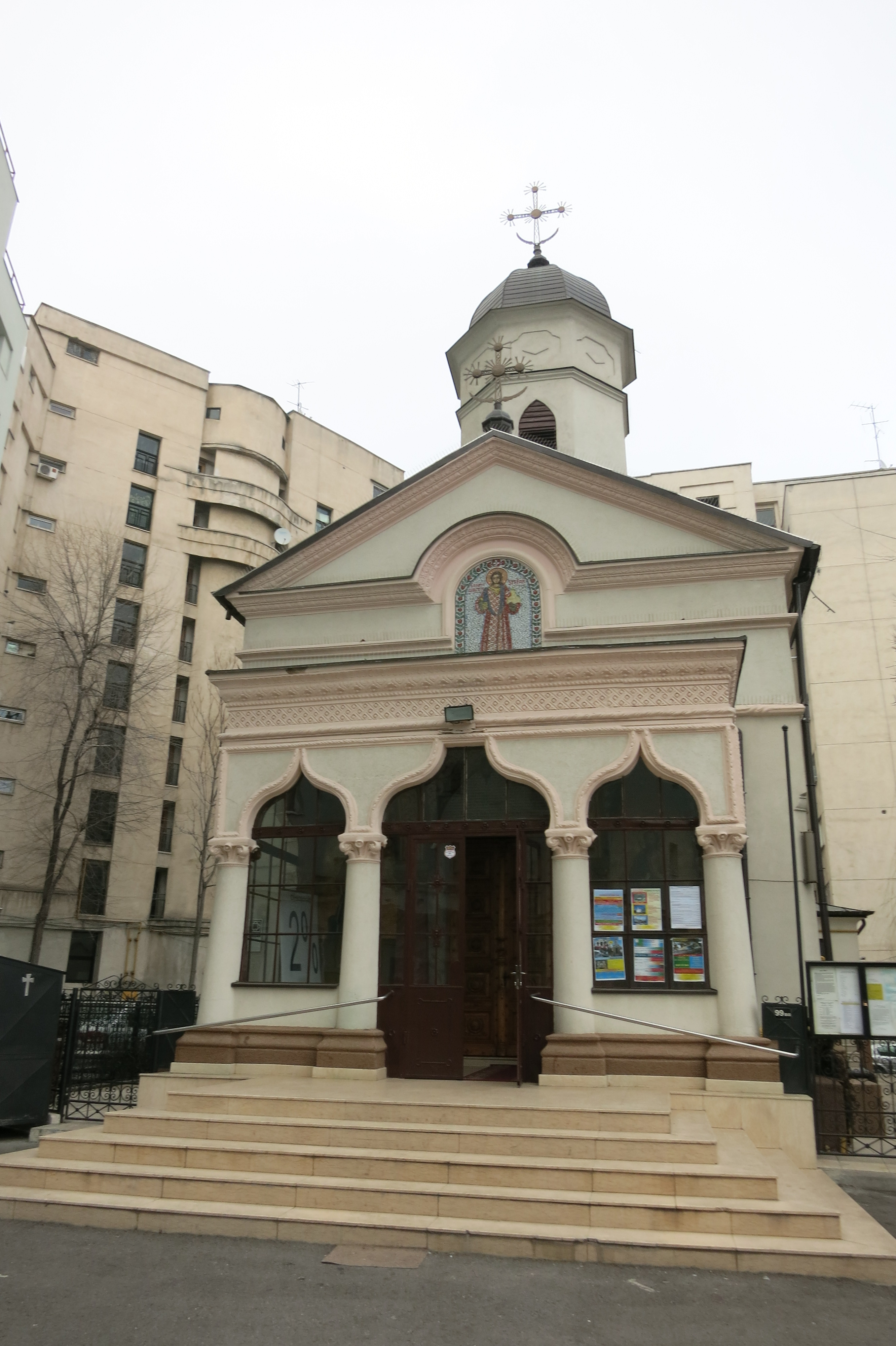 Biserica Sf. Ștefan - Cuibu' cu Barză municipiul București Str. Știrbei Vodă 97 sector 1 sec. XVIII